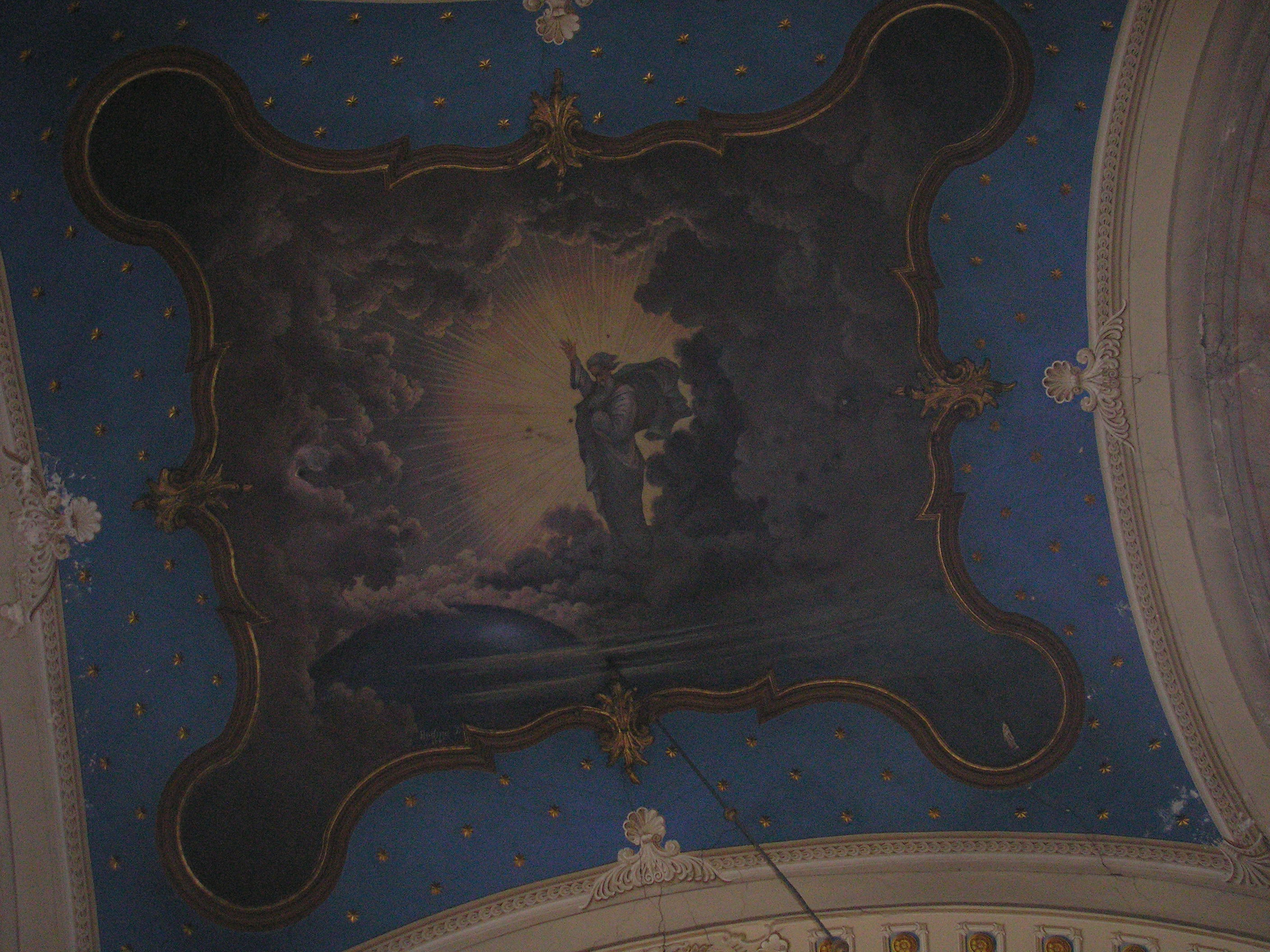 A világ teremtése (Szerb ortodox templom, Szeged)